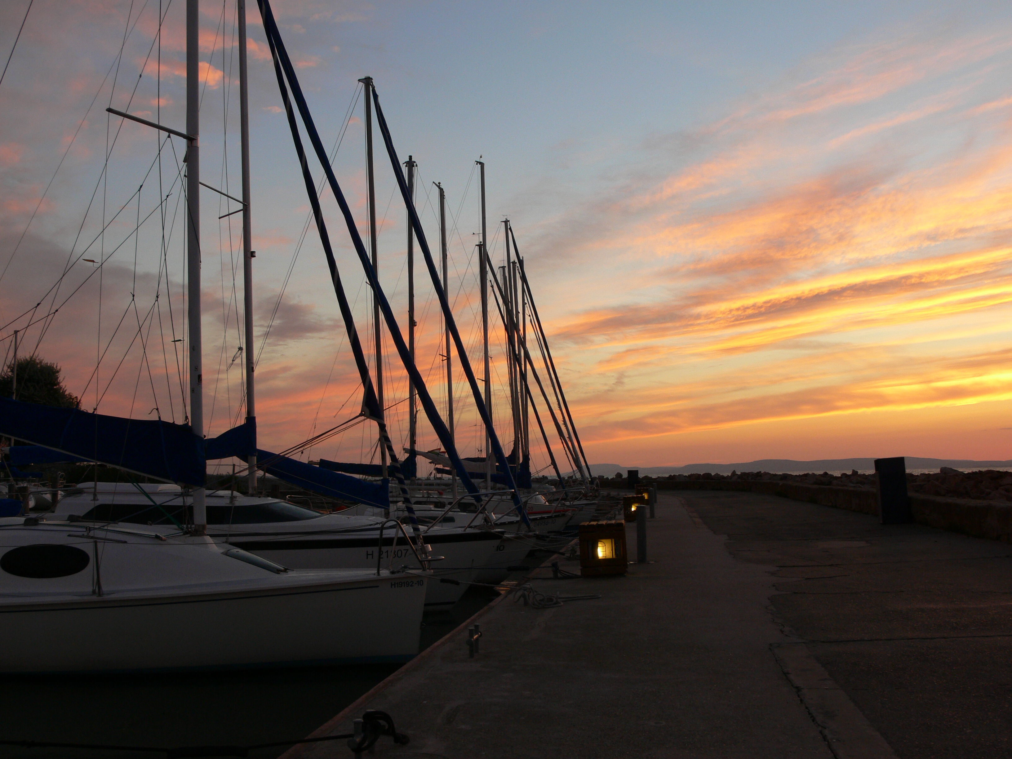 Balatonföldvár, kikötő